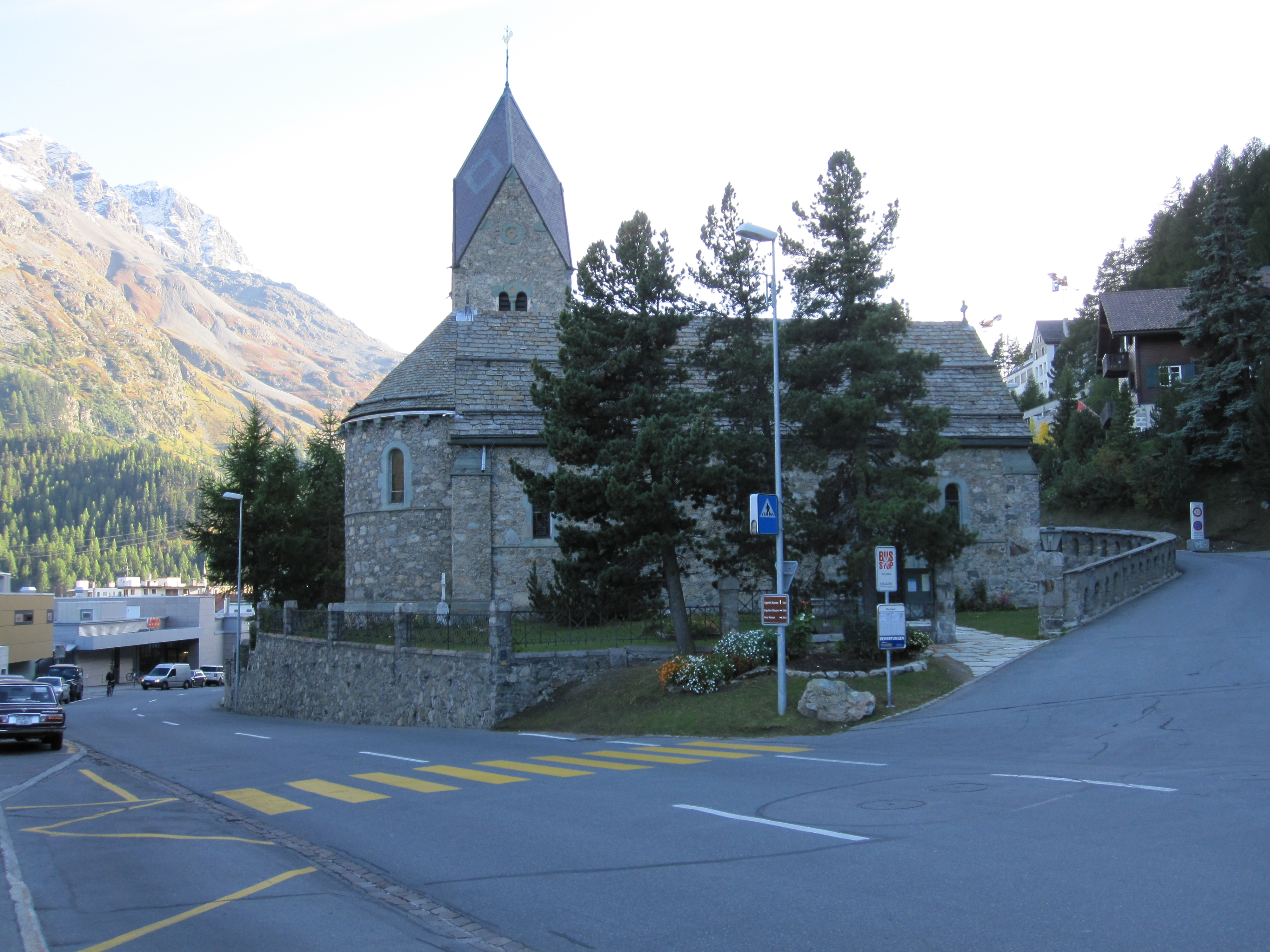 evangelische Badkirche in St. Moritz (Kanton Graubünden)